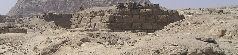 Vue d'ensemble site archéologique - mastaba de Seshemnefer III.